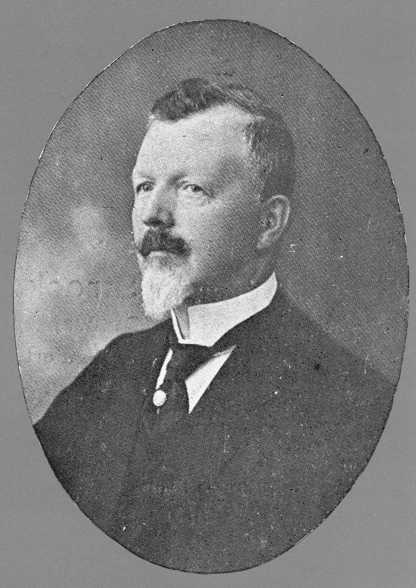 Le peintre luxembourgeois Joseph-Germain Strock (1865-1923)